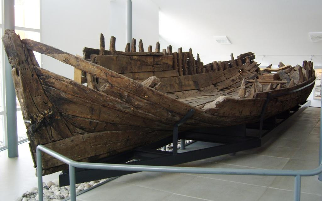 Uelvesbüller Wrack eines Frachtseglers (Baujahr ca. 1600